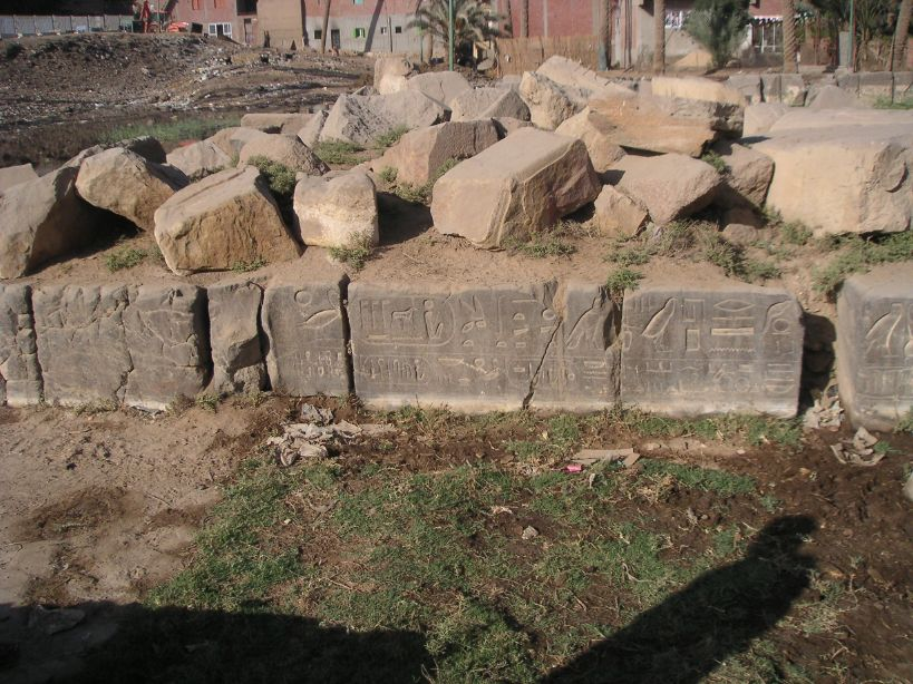 Pylône et salle hypostyle du grand temple de Ptah de Memphis ; les soubassements de l'édifice édifié en grès sont en granite et portent les titulatures de Mérenptah et de Ramsès III - XIXe et XXe dynastie égyptienne